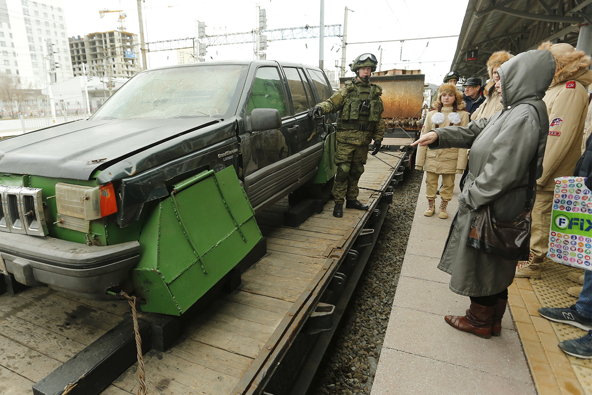 Сирийский перелом в Волгограде